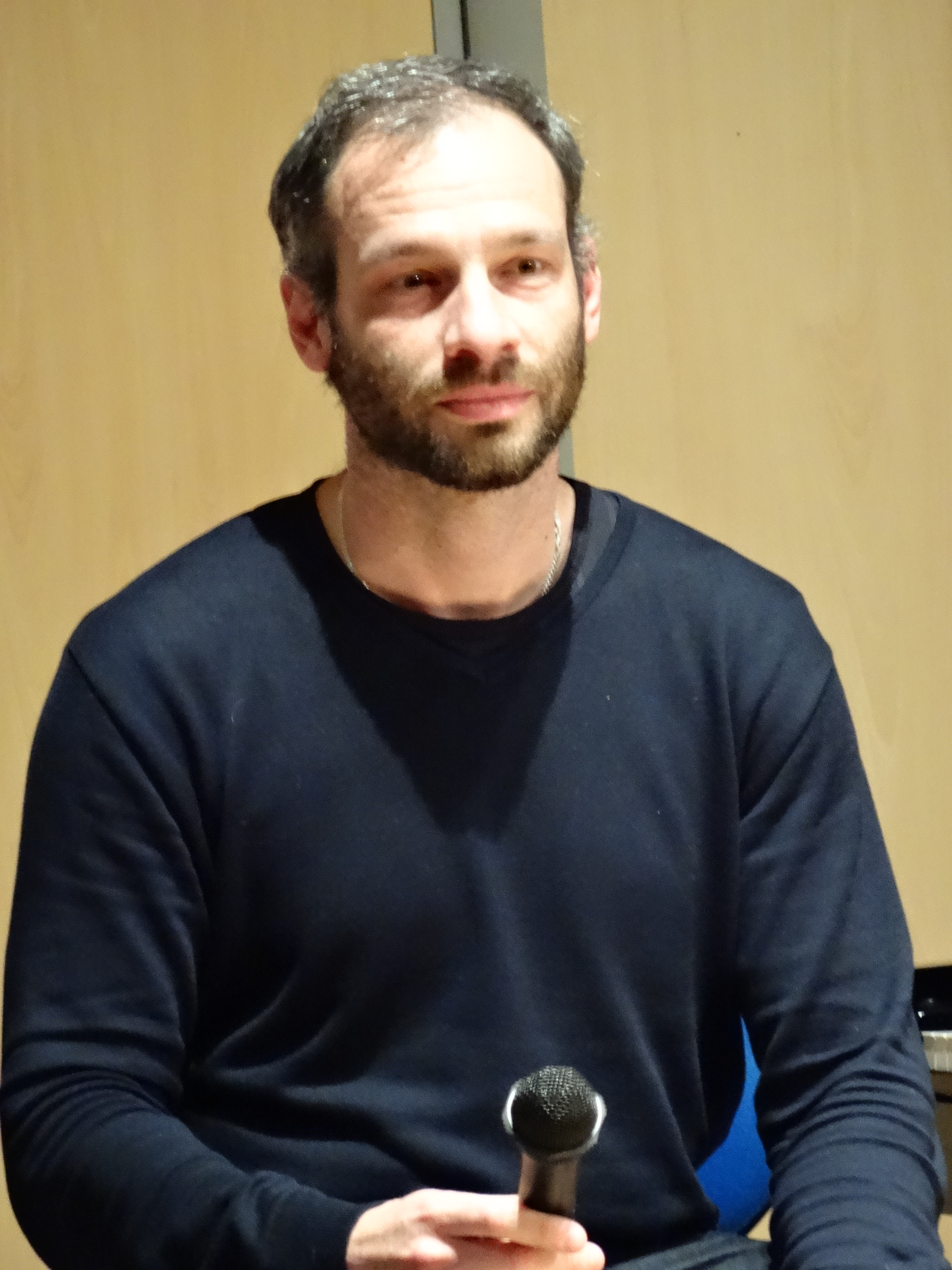 Dima Slobodeniouk director da Orquestra Sinfónica de Galicia, no acto "Batutas e bastóns" en Culleredo.